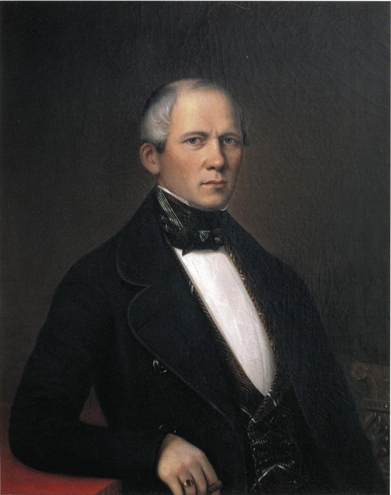 J. E. Lindhin muotokuva Viipurin läänin kuvernööri Casimir von Kothenista. Maalauksen omisti aikoinaan Viipurin historiallinen museo, nykyään Lahden historiallinen museo.